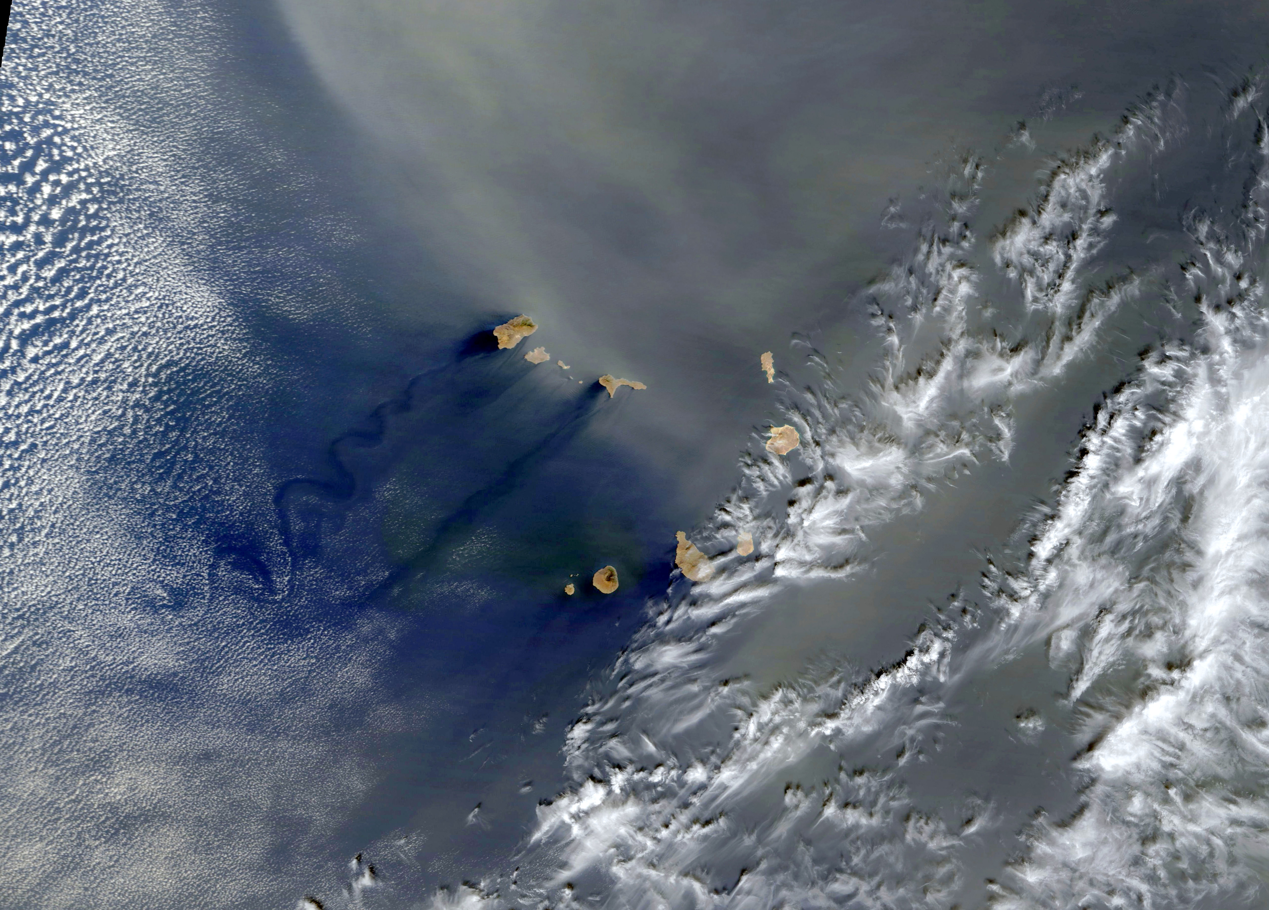 Detalle de la imagen anterior mostrando las islas de Cabo Verde, que dejan unas huellas en forma de ríos en el océano formadas por las aguas frías que ascienden del fondo por el "upwelling" forzado por el movimiento de rotación terrestre.